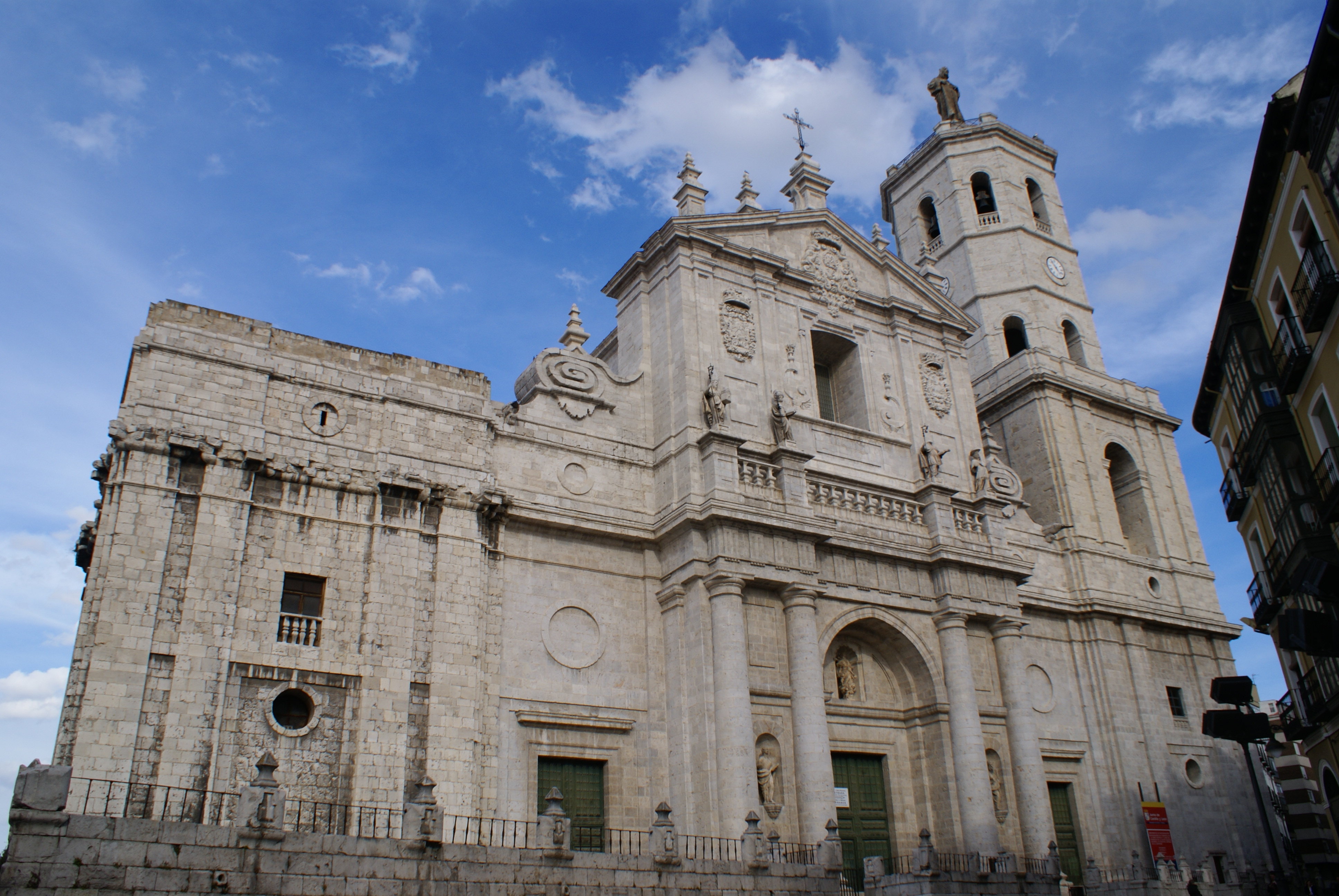 Valladolid – España (Spain) - Catedral Se debió de empezar a construir hacia el año 1580 según los planos de Juan de Herrera, cuando este abandonó su construcción, esta fue continuada por Pedro de Tolosa, Diego de Praves y por su hijo Francisco de Praves. Se inauguró en 1668 y aunque durante el siglo XVIII se continuaron las obras, la construcción quedó inacabada, sin llegarse a terminar el proyecto de Juan de Herrera. La torre fue levantada en 1841